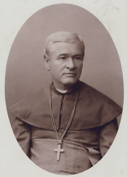 Antanas Baranauskas in 1899